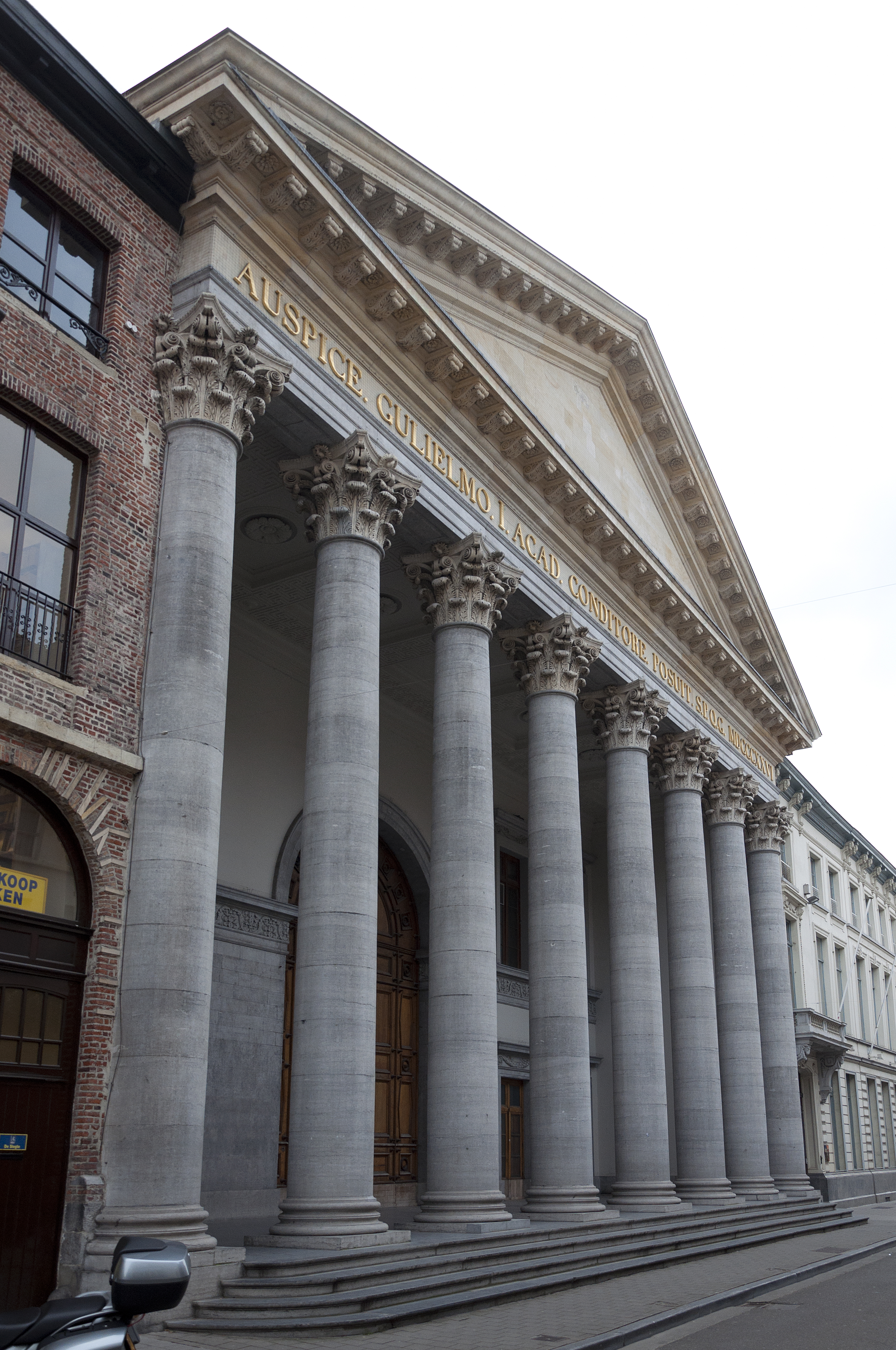 De Aula Academica te Gent, België